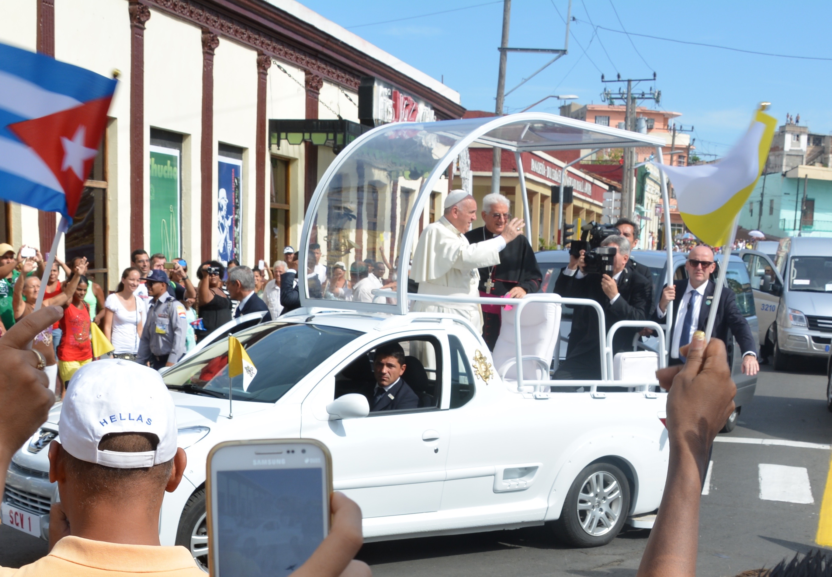 Papst Benedict in Santiago de Cuba